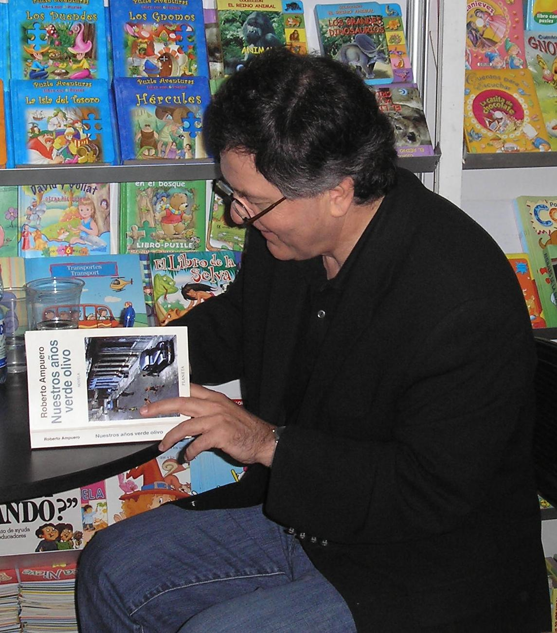 Roberto Ampuero firmando libros en la Feria Chilena del libro de Viña del Mar. En el Liceo de Niñas